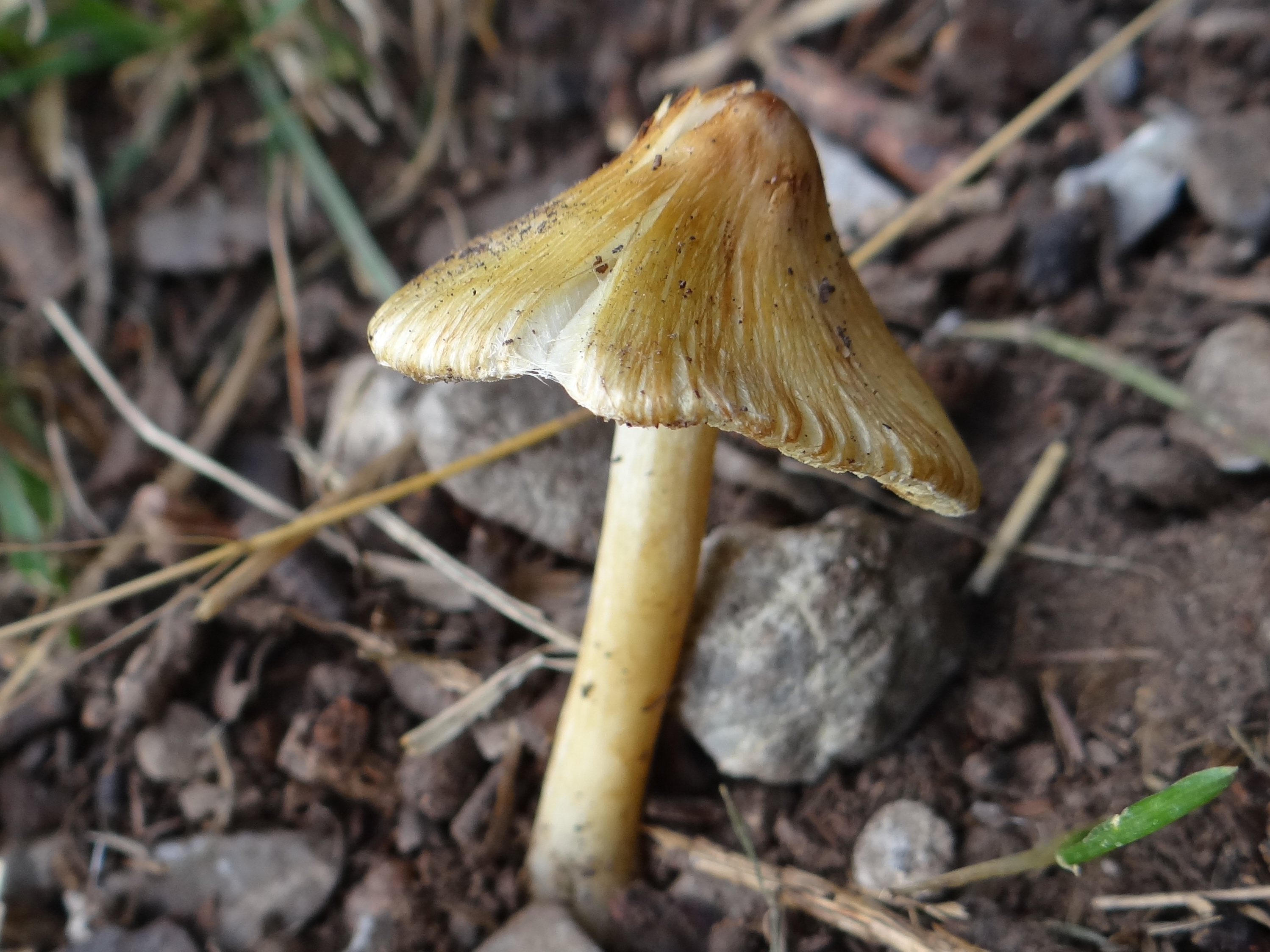 Inocybe rimosa (location: Slovakia, Veľká Fatra)